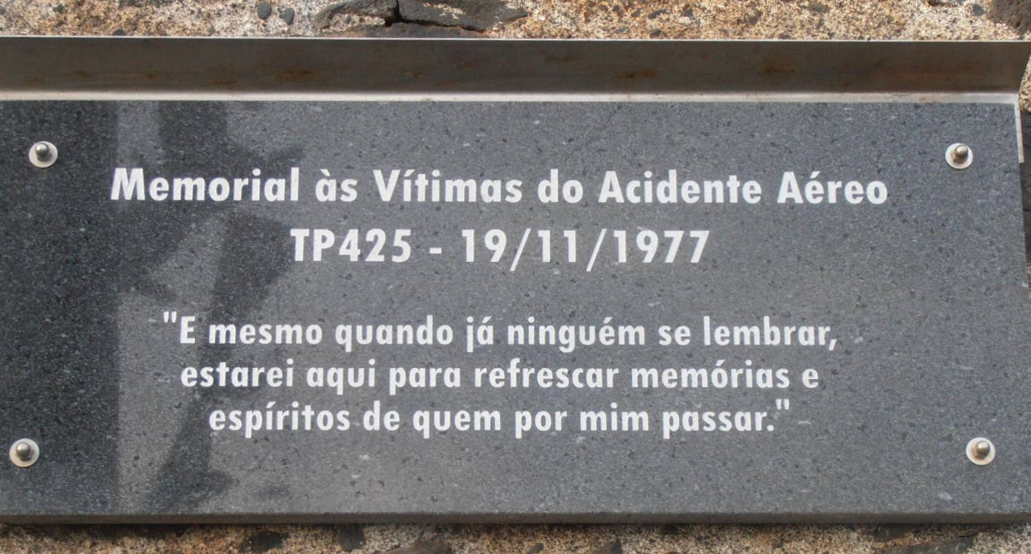 Memorial near Madeira Airport